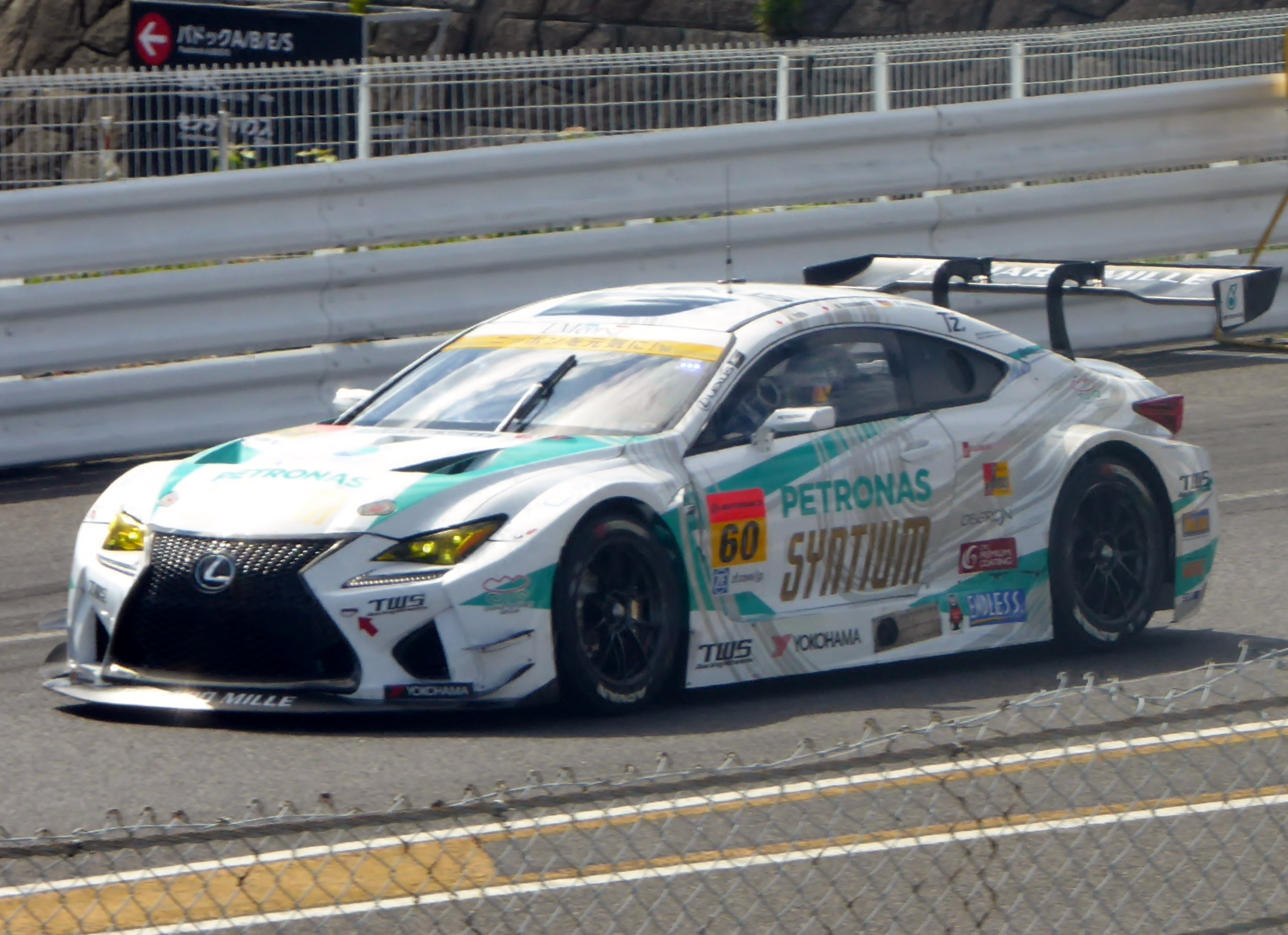 2016年鈴鹿1000㎞における60号車SYNTIUM LMcorsa RC F GT3を撮影。